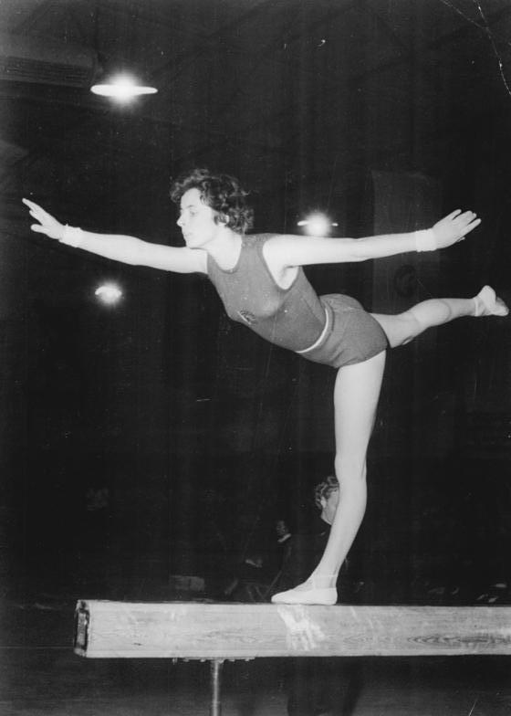 Roselore Stöbe Zentralbild Bez.Red.Rostock Bey-Ho 11.12.1955 Löwe DDR-Mannschaftsmeisterschaft im Geräteturnen. Am 10. und 11.12.1955 standen sich in der Kongreß-Halle in Güstrow die besten Spitzenturnerinnen und Spitzenturner der DDR in der Mannschaftsmeisterschaft im Geräteturnen gegenüber. UBz: Roselore Stöbe (SC Lok) bei ihrer Übung am Schwebebalken.